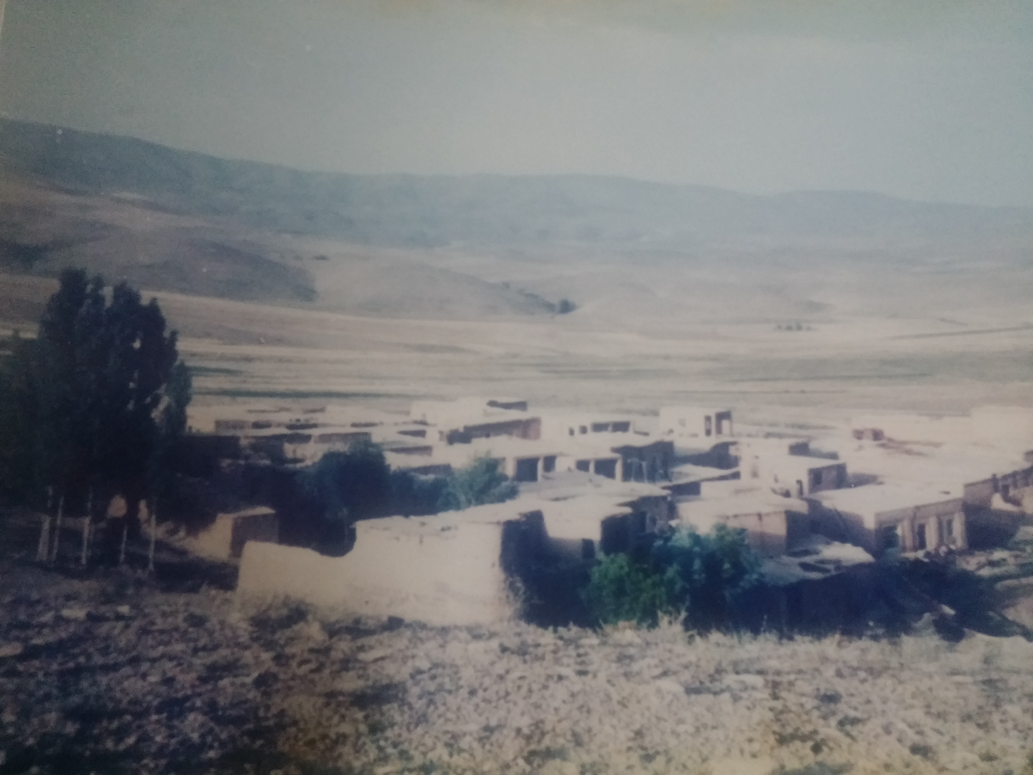 عکس سال62